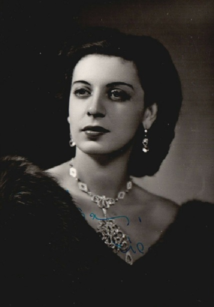 Elisabetta Barbato